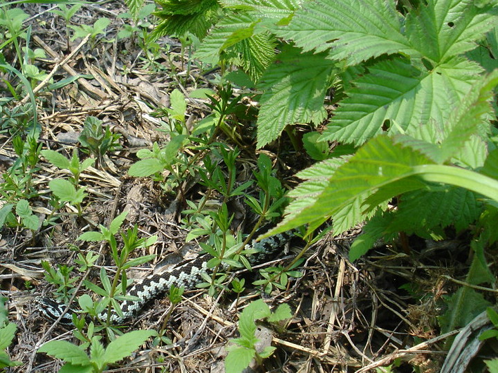 Vipera berus (photography made in Darów, Pogórze Bukowskie) Poland